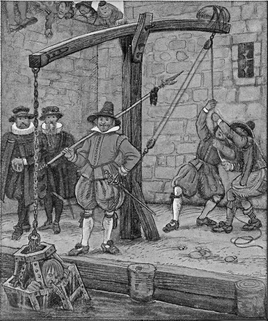 Bestrafung mit Hilfe eines Schnapp- oder Wippgalgens